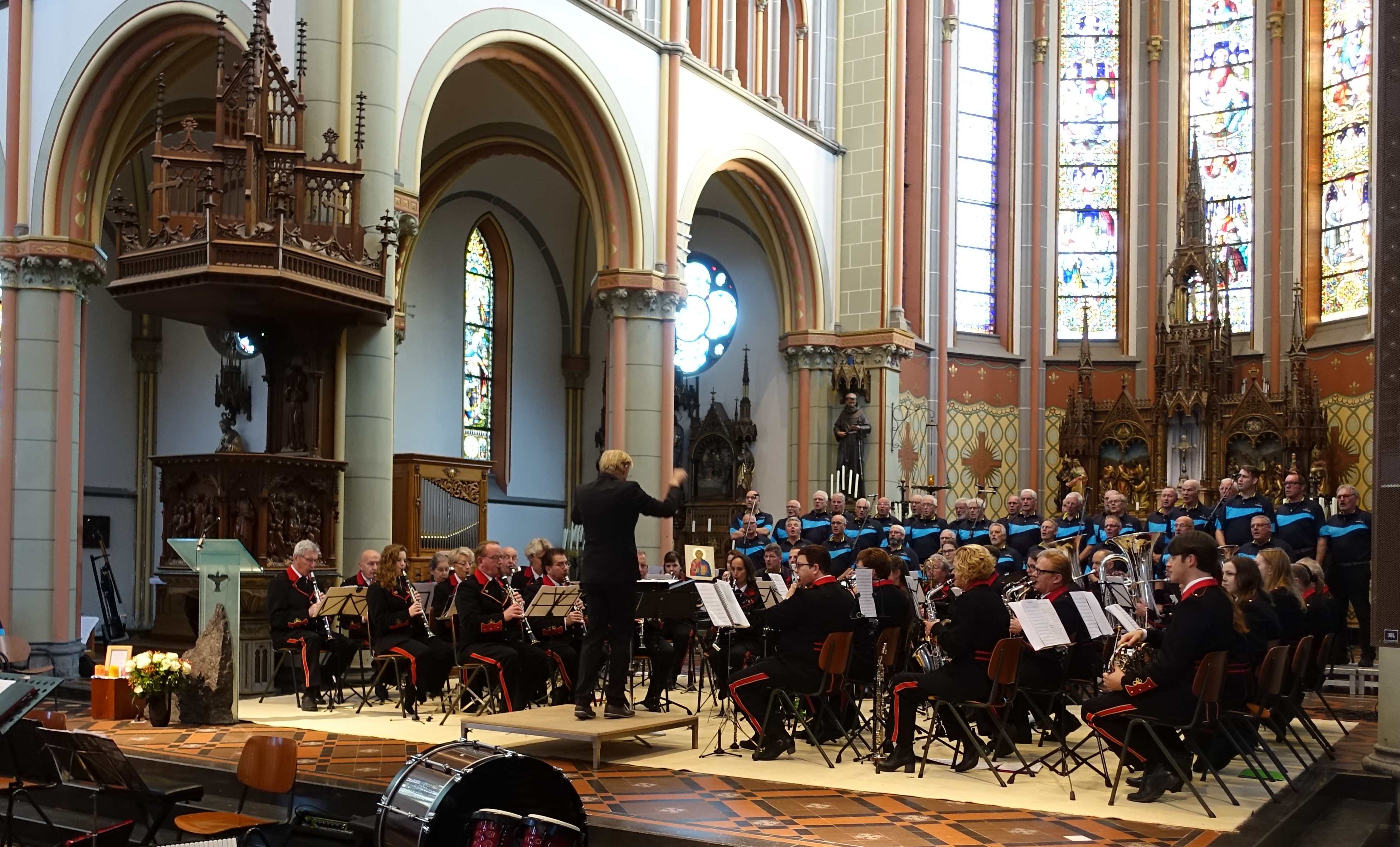 Harmonie de Vriendschap o.l.v. Jan van Dam in de Bonaventura kerk Woerden